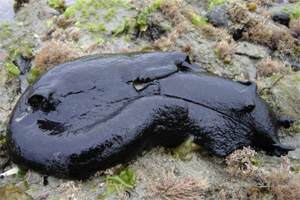 Liebre de mar Aplysia vaccaria. California, EE.UU. Este gasterópodo es el de mayor tamaño del mundo, alcanzando hasta 99 cm de largo.